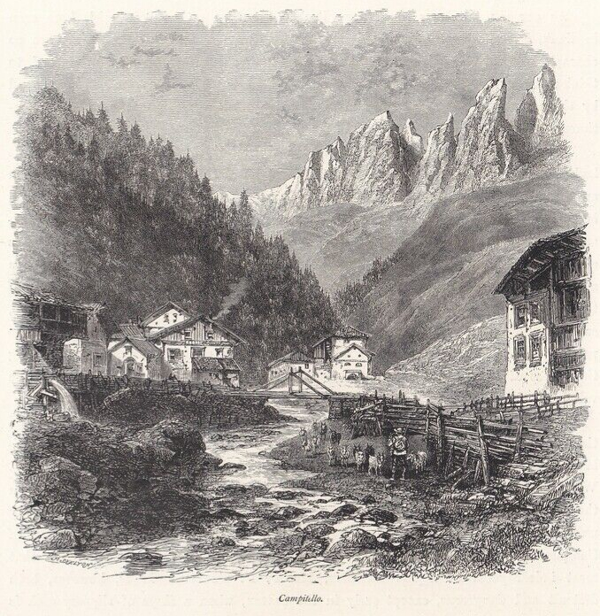 Campitello di Fassa, Trient, Fassatal, Holzstich um 1885, Blattgröße: 18,5 x 21,3 cm, reine Bildgröße: 16,5 x 16 cm.